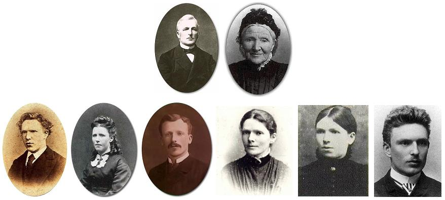 Gezin van Vincent van Gogh Hijzelf, zijn ouders, broers en zussen. Van boven naar beneden en van links naar rechts: De ouders: Theodorus van Gogh (1822-1885) Anna Cornelia van Gogh-Carbentus (1819 - 1907). Hun kinderen: Vincent Willem, de schilder (30 maart 1853 - 29 juli 1890) Willemina Jacoba (16 maart 1862 - 17 mei 1941); Theo (1857-1891) Elisabetha Huberta (1859-1936) Willemina Jacoba Cornelis Vincent (1867-1900)